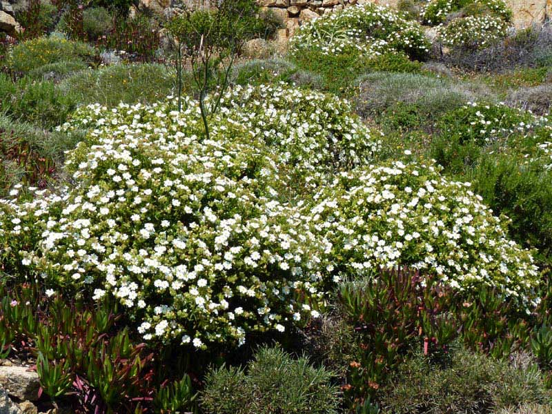 Cistus salviifolius